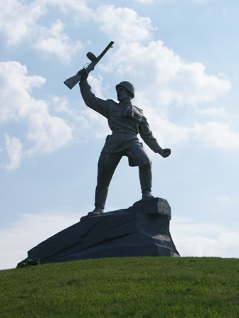 х. Степанов, Матвеево-Курганский район